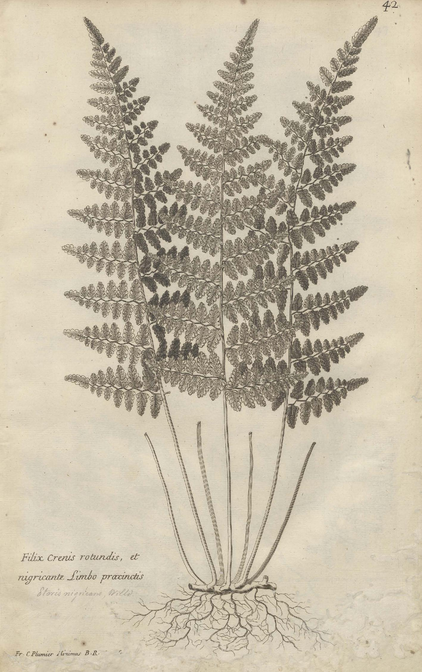 Traité des Fougères de l Amérique-page-001